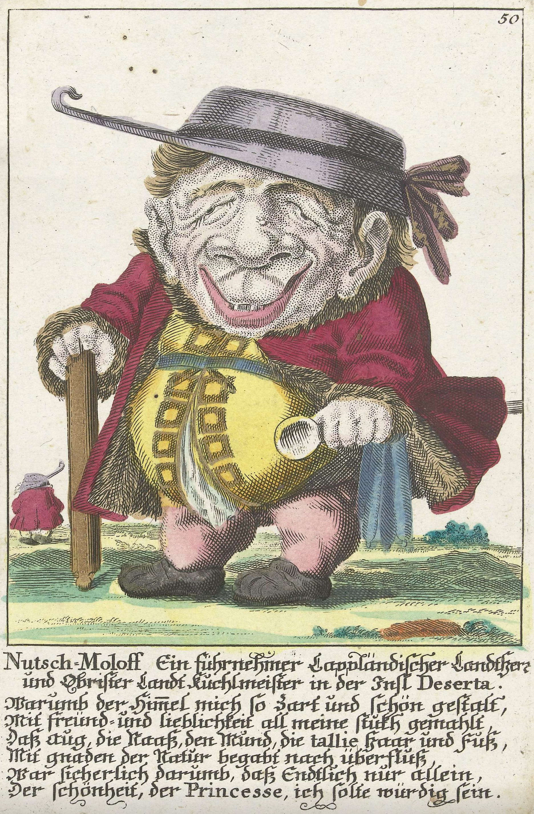 Nutsch-Moloff. Ein fürnehmer Lappländischer Landtherr und Obrister Landt Kuchlmeister in der Insl Deserta. Kolorierter Kupferstich nach einer Vorlage Jacques Callots (Varie figure gobbi di Jacobo Callot, erschienen 1622)[1]